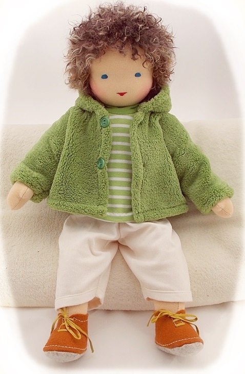 Waldorf Puppe franzispuppen